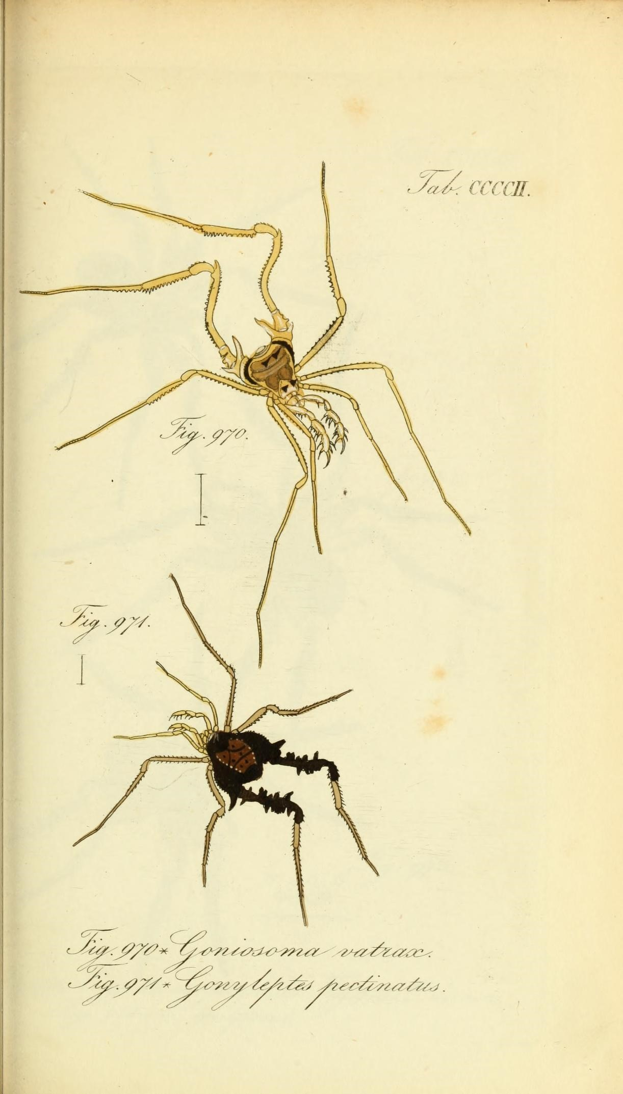 /. CCCCff.